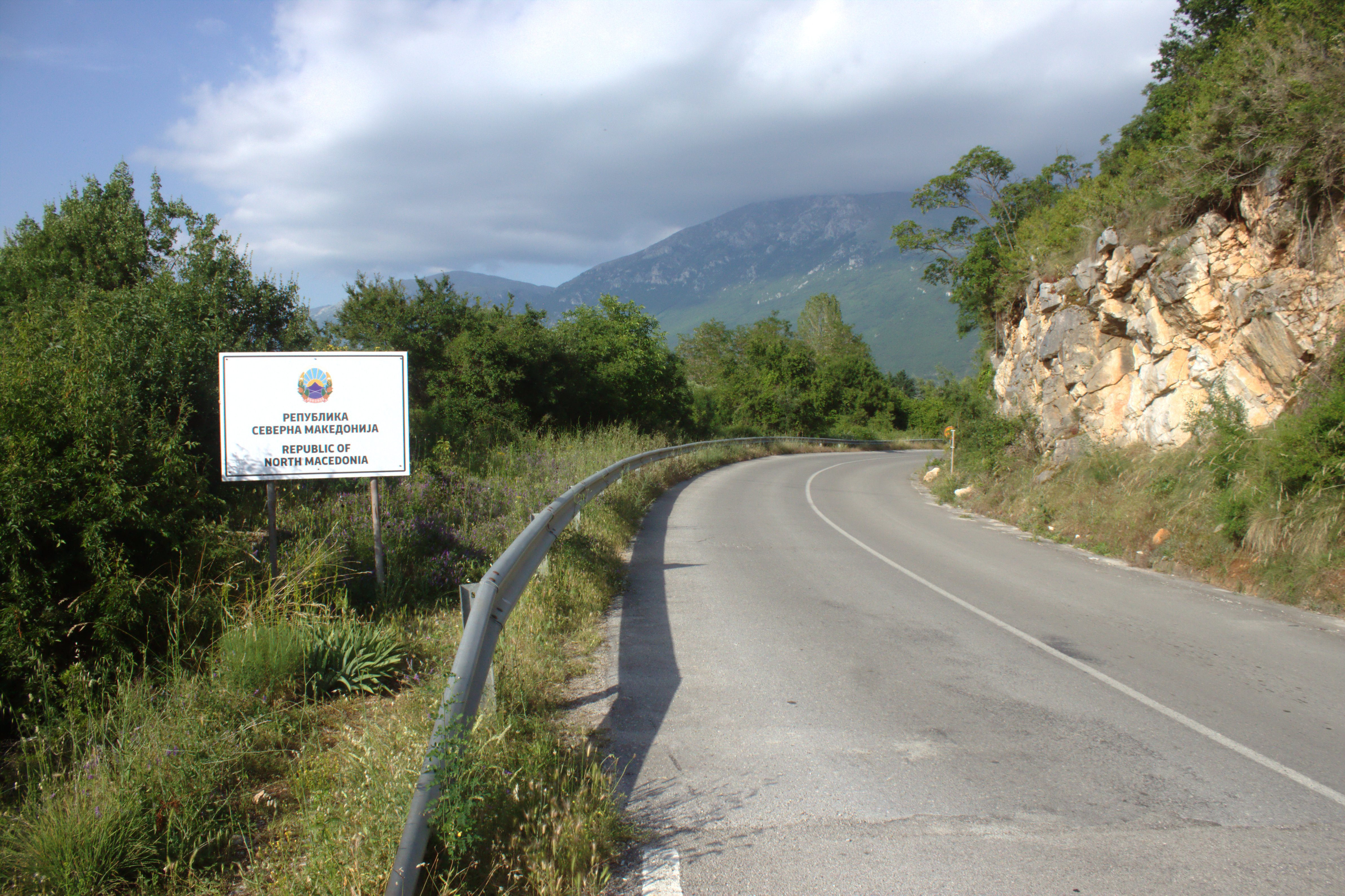 Státní hranice v lokalitě Sveti Naum na hranici Severní Makedonie s Albánií